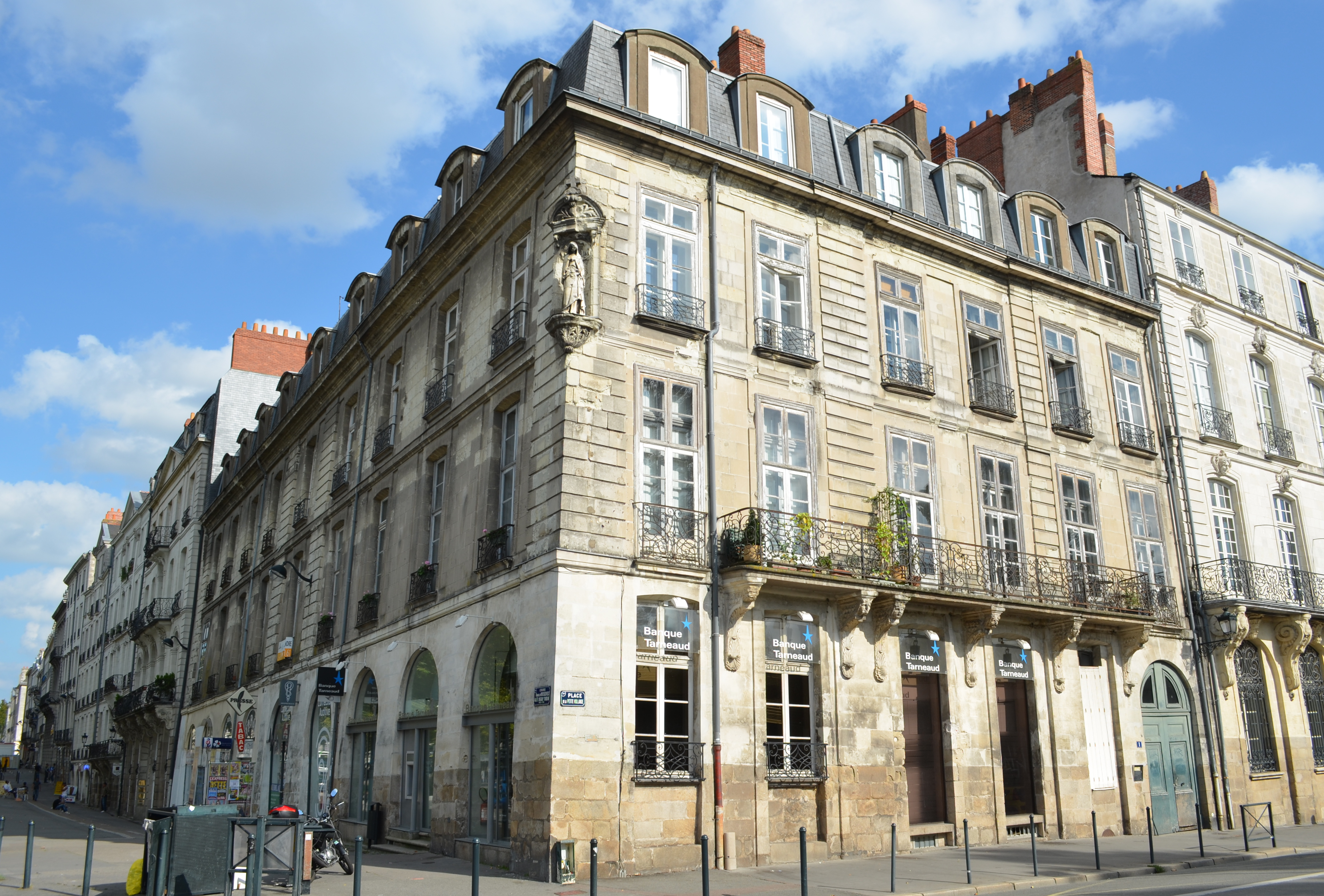 Immeuble 18è s. situé 1 place de la Petite-Hollande ; 17 allée Duguay-Trouin - Nantes. .